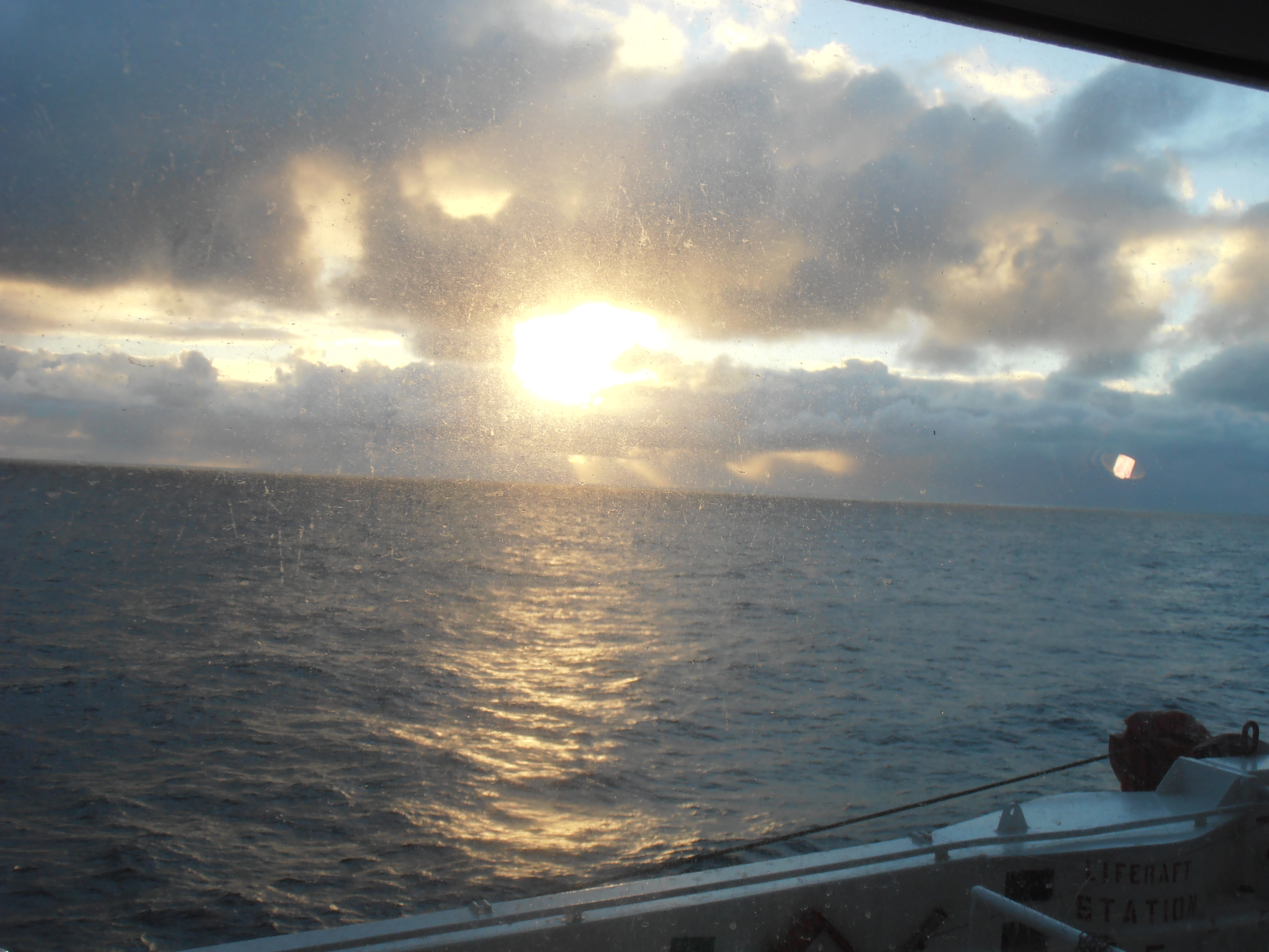 Sol de mitja-nit a Alta (Noruega).